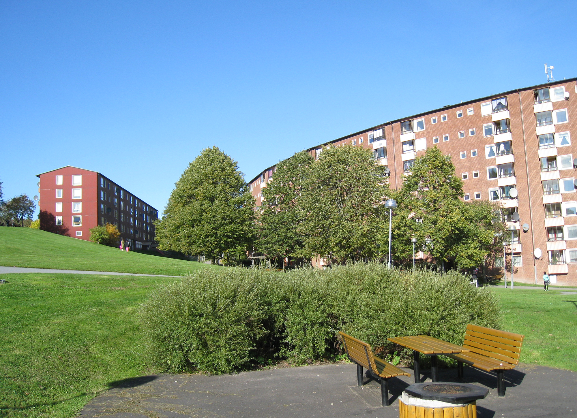 Housing estate. Tellusgatan, Bergsjön, Göteborg